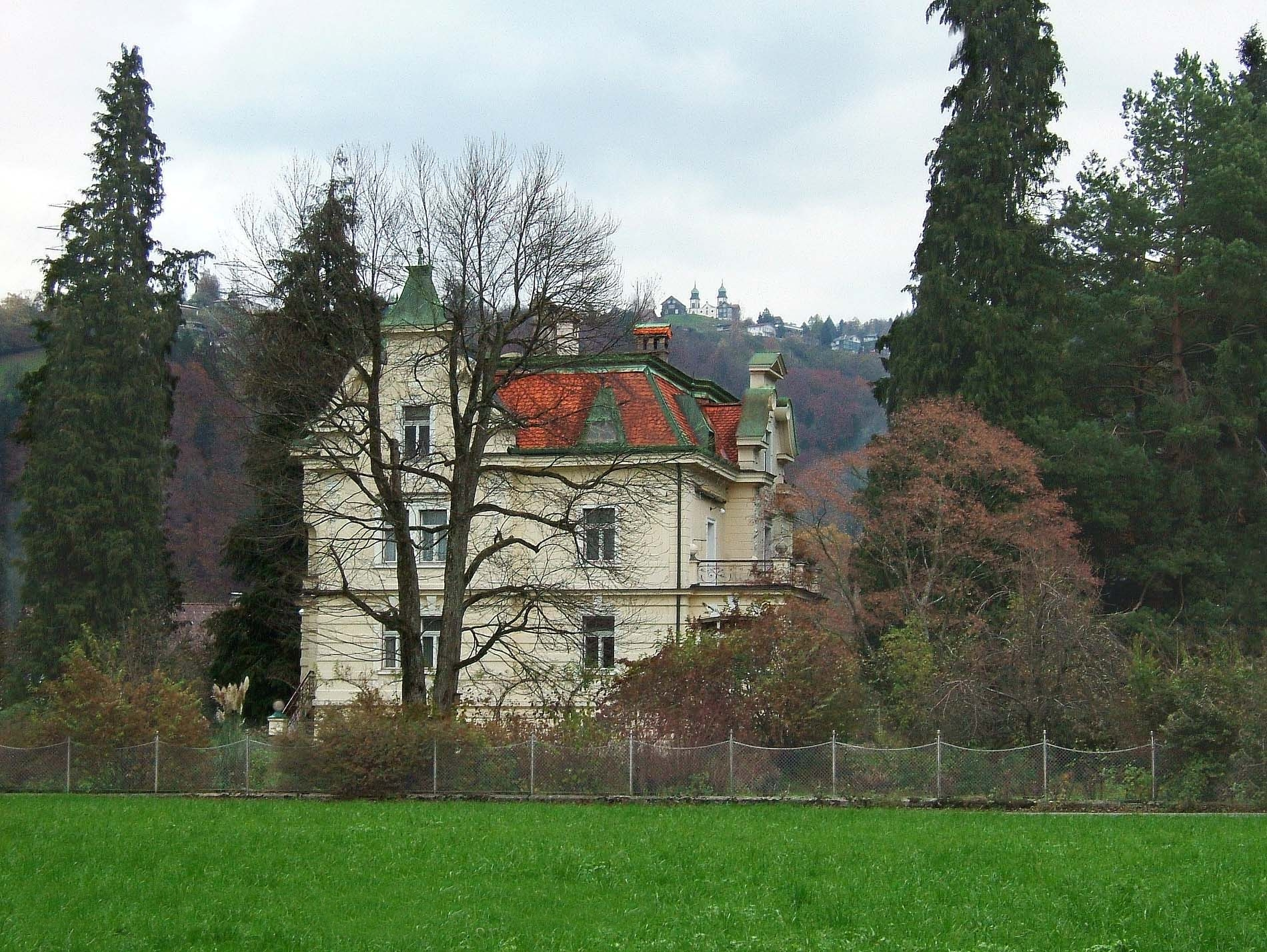 "Villa Zuppinger" in Rickenbach, Wolfurt